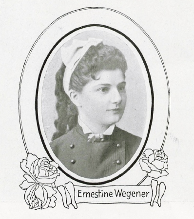 Ernestine Wegner (1854-1883), deutsche Theaterschauspielerin und Sängerin.